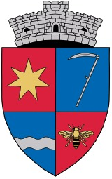 Stema Albești, Botoșani